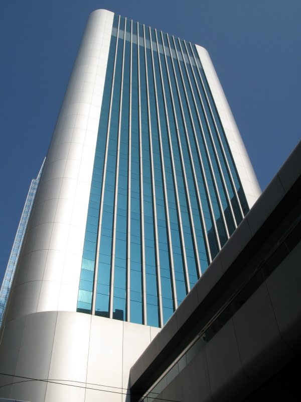 Hang Seng Headquarter